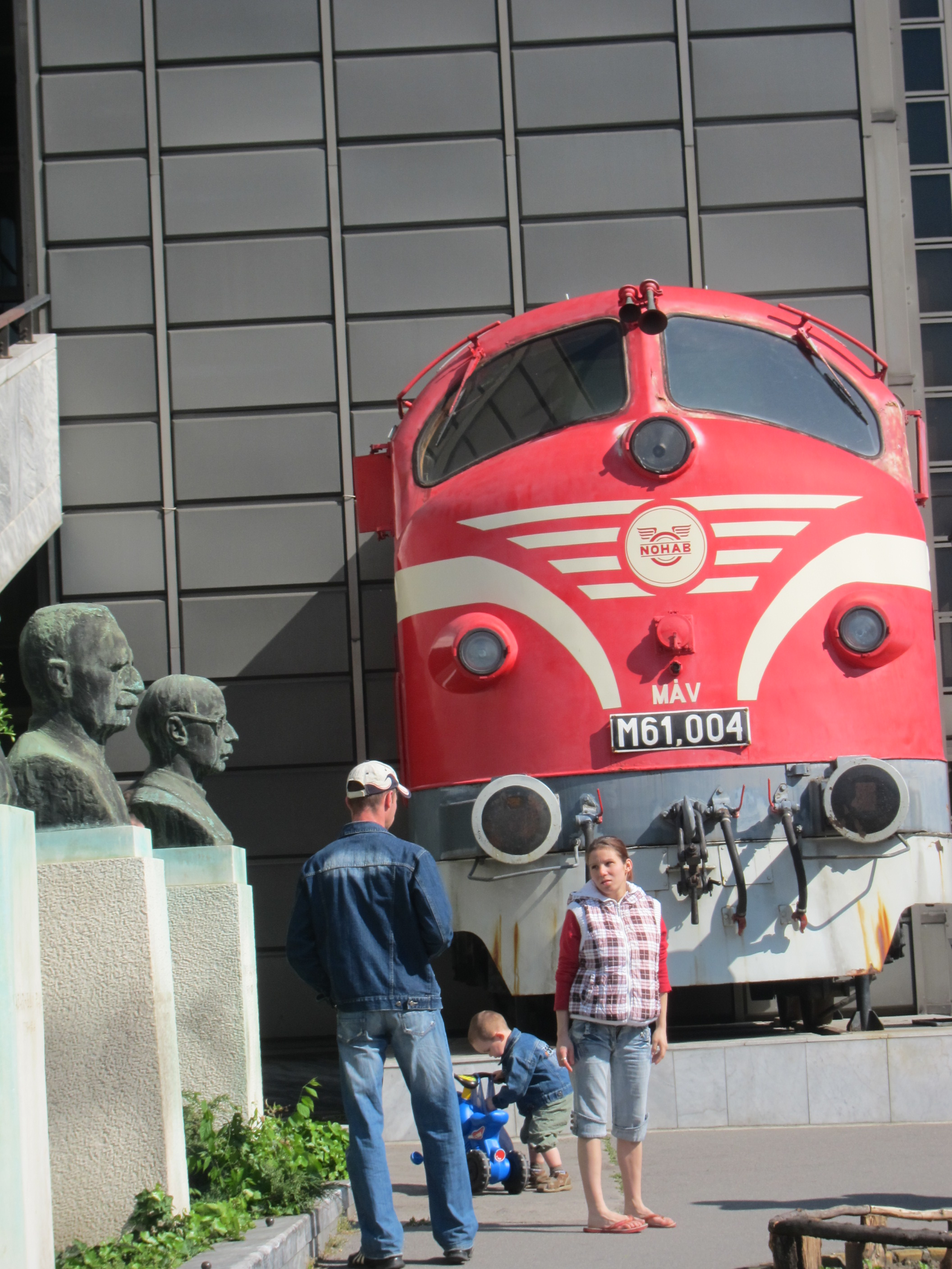 Музей на транспорта в Будапеща влак